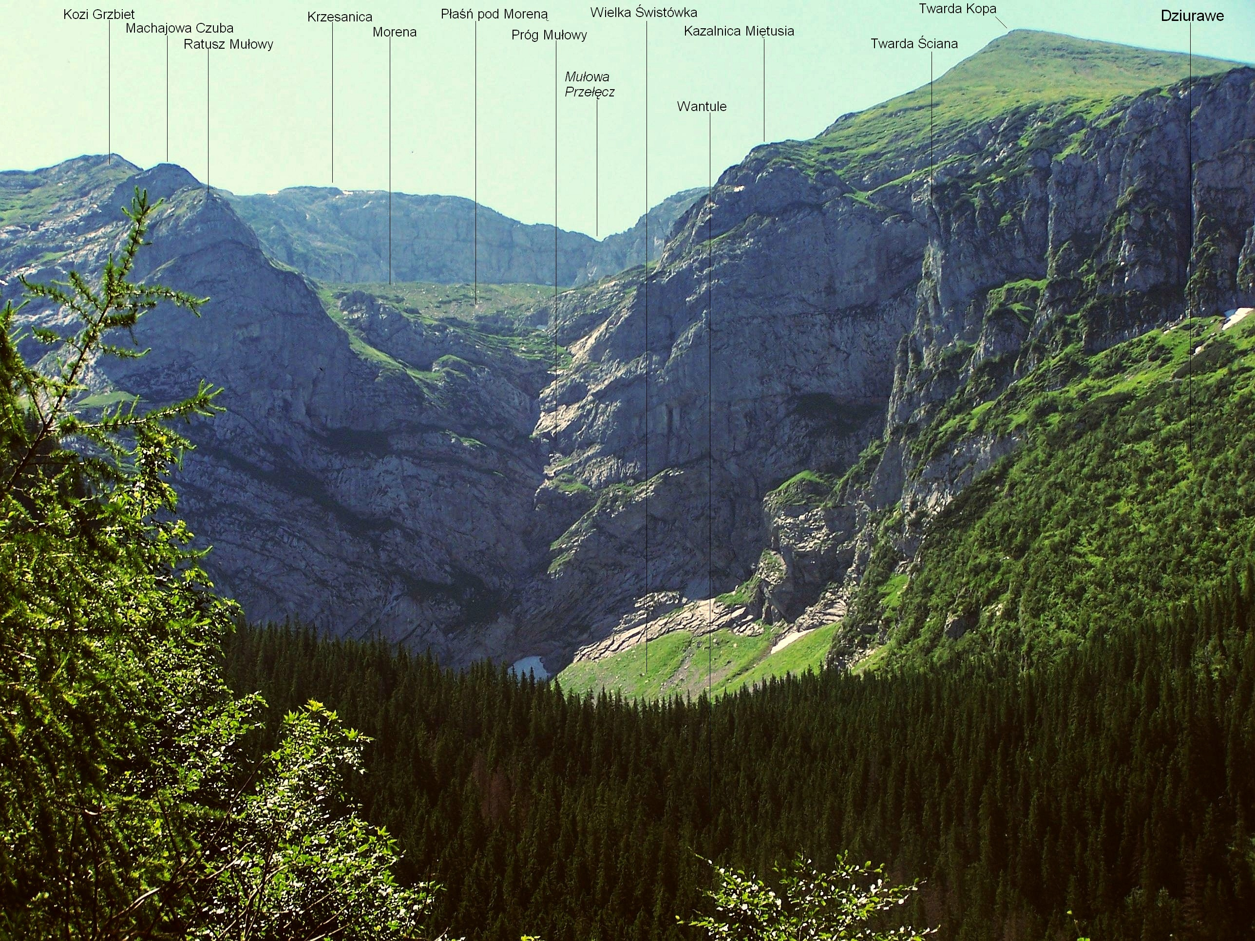 Widok od północnej strony